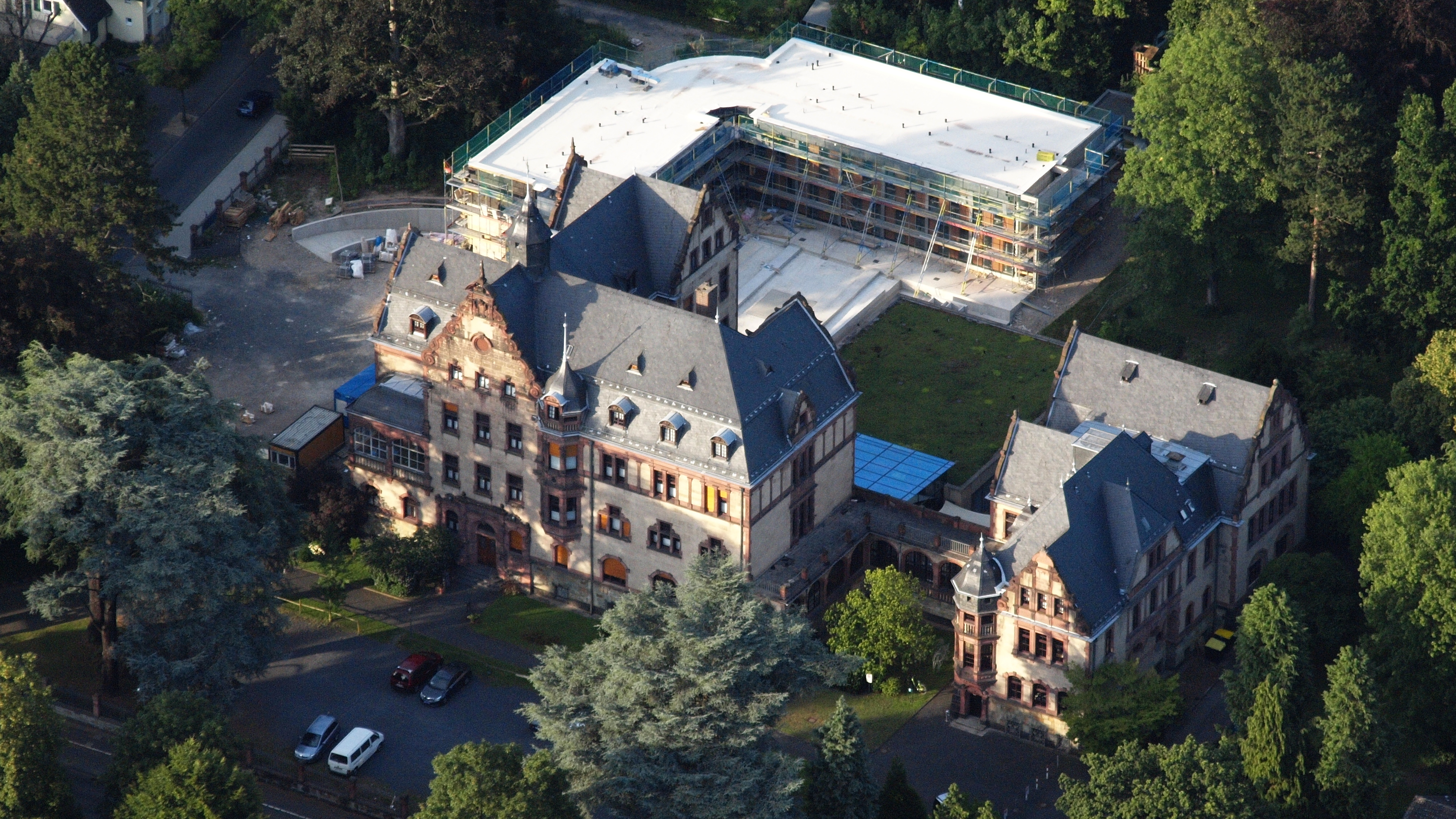 Physikzentrum Bad Honnef, Hauptstraße 5, Bad Honnef: Luftaufnahme (2015); hinten das im Bau befindliche Gästehaus